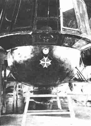 L 54's gondol smykket med Pour le Mérite-ordenen.